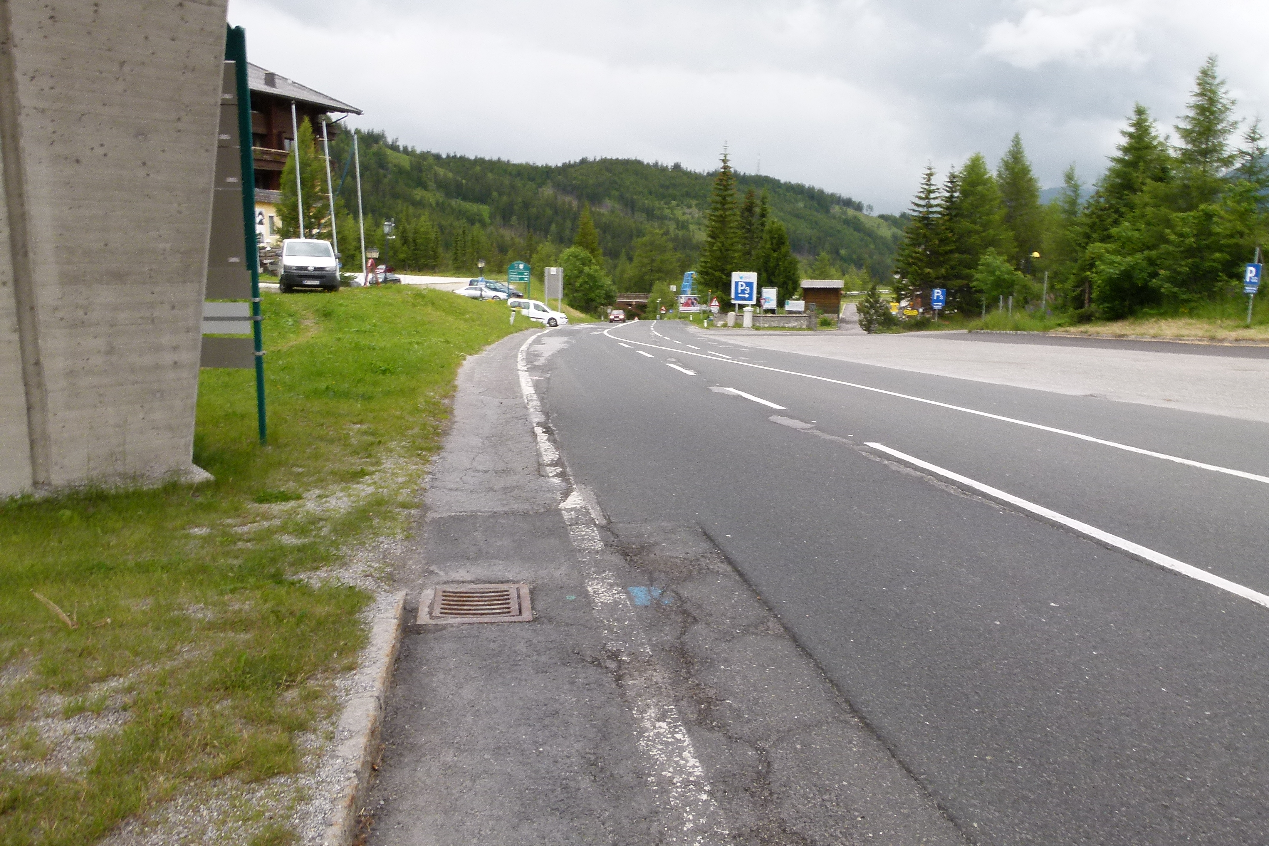 Gaberl-hágóút